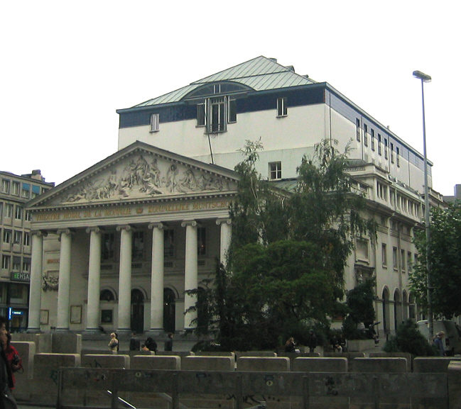 Bruxelles, Théâtre de la Monnaie